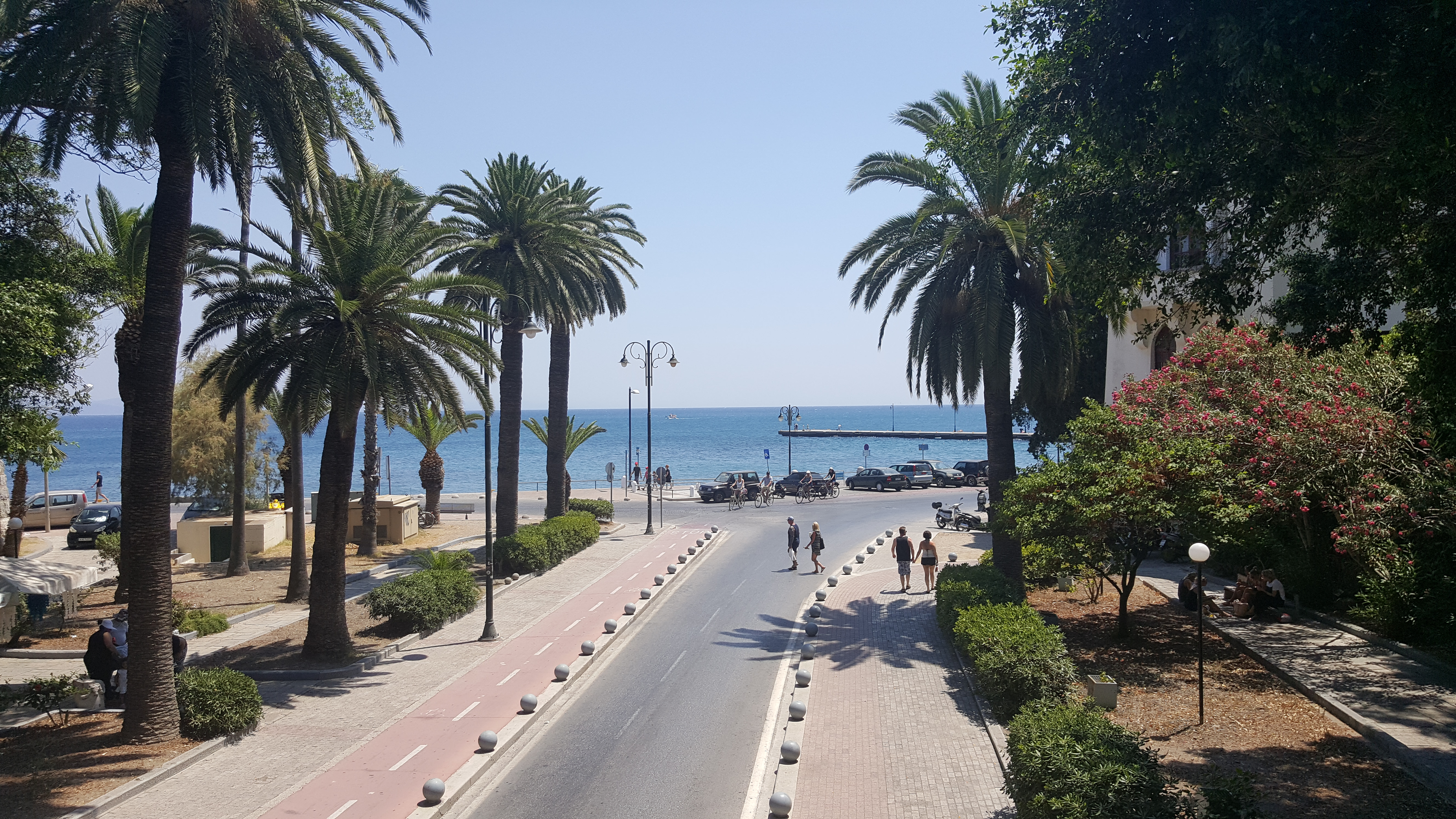 Boulevard Kos